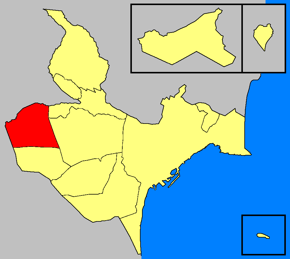 Entidades de población del término municipal de Alicante